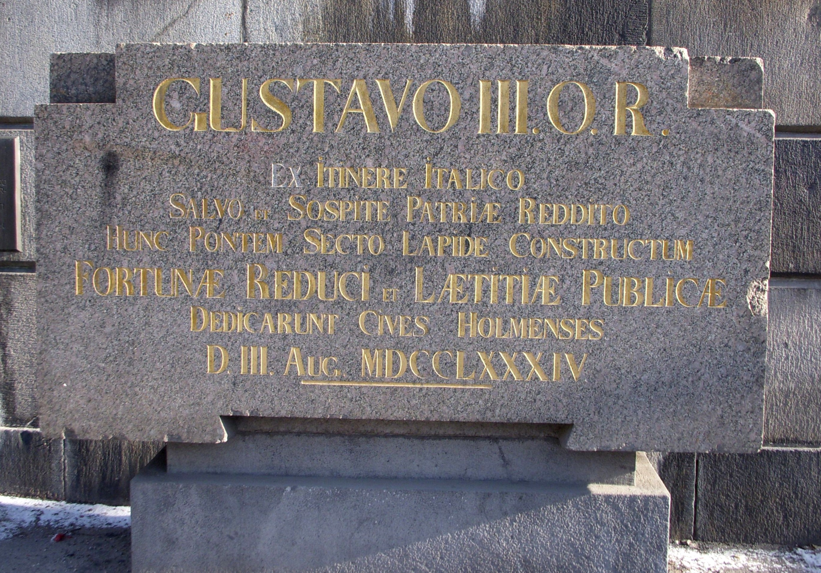 Gustaf III:s minnessten vid Riddarholmsbron i Stockholm